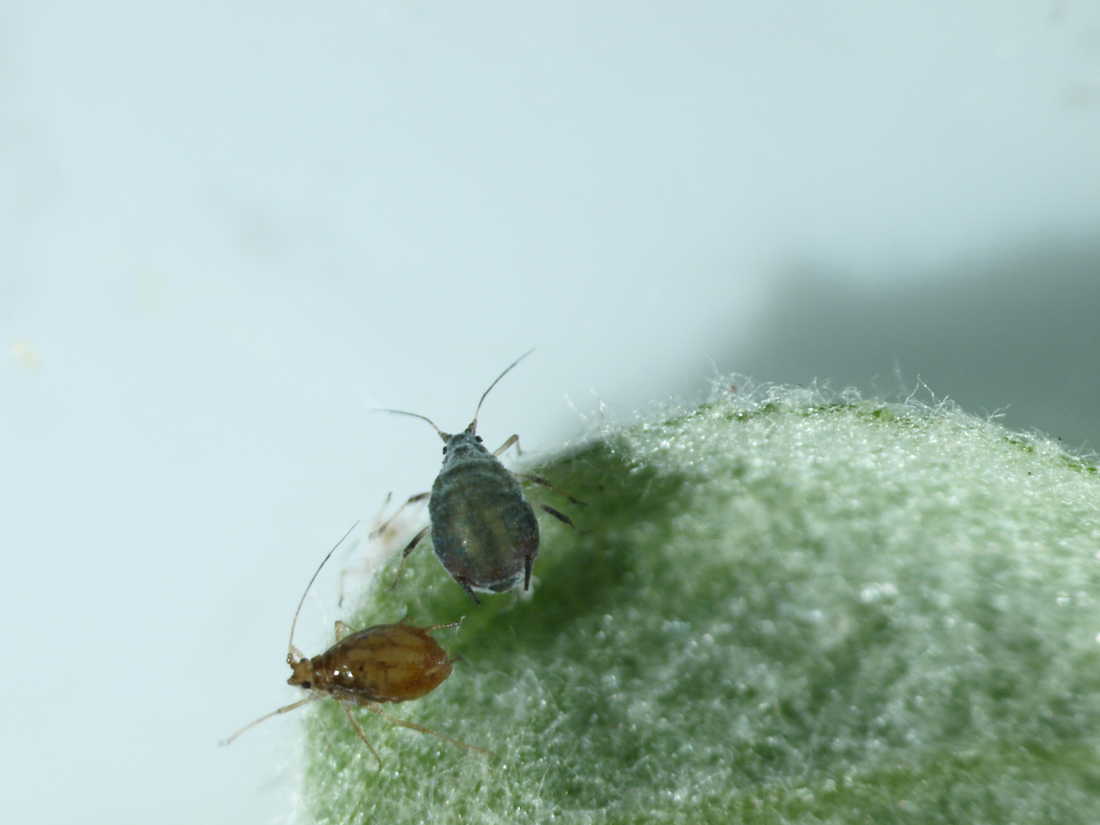 à gauche fondatrigène (Dysaphis plantaginea) du plantain (hôte secondaire)à droite fondatrice(Dysaphis plantaginea) du pommier (hôte primaire)